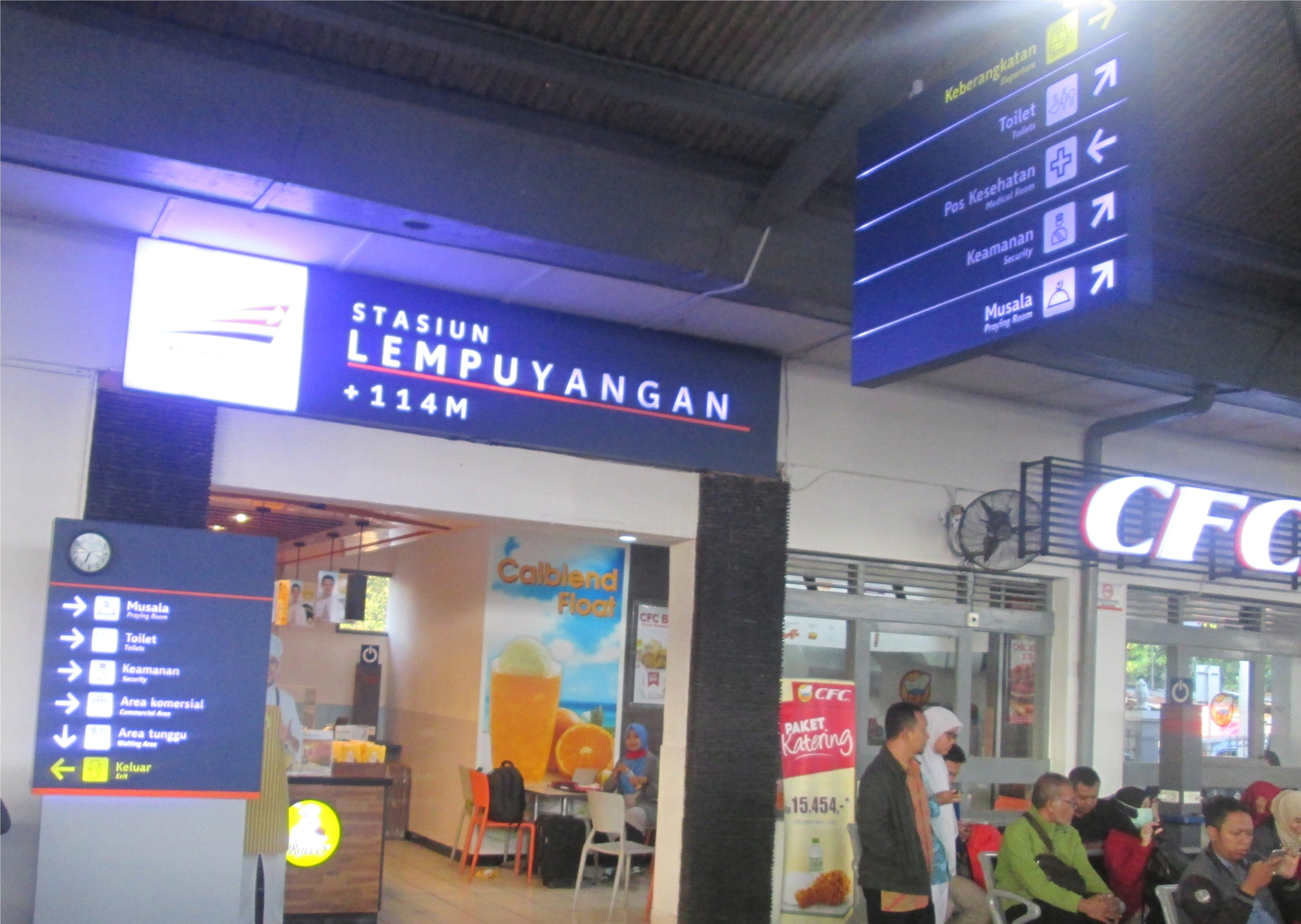 Suasana peron stasiun Lempuyangan, 2017